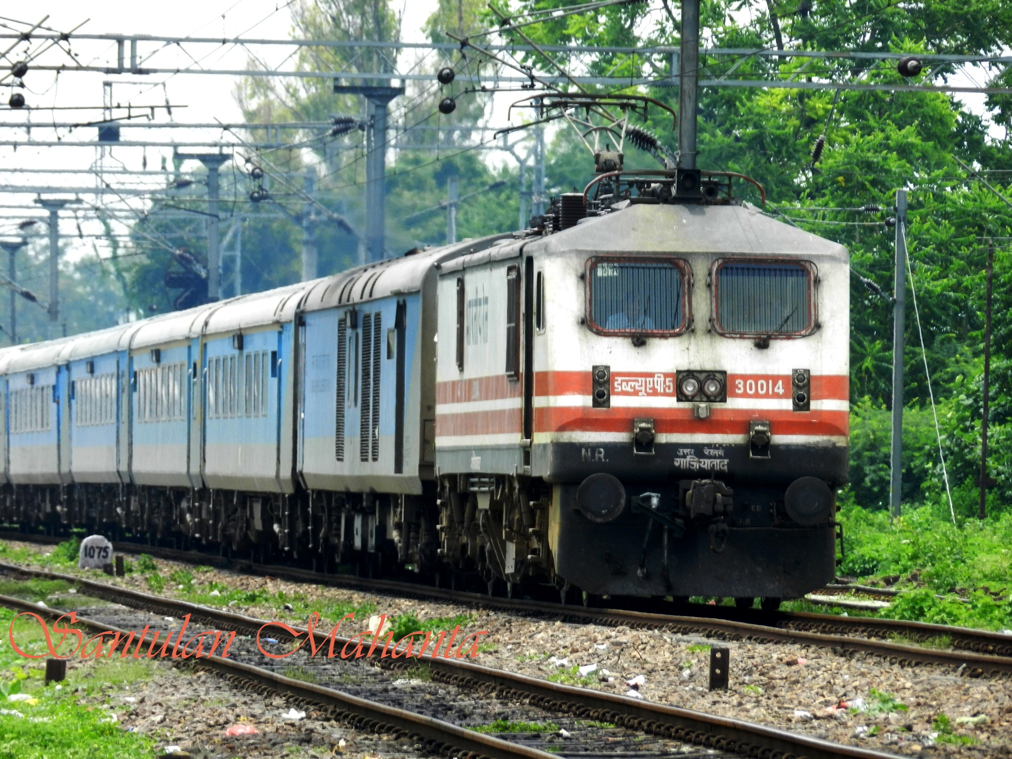 WAP-5 aus dem Betriebswerk Ghaziabad führt den Schnellzug Nr. 12004 Swarn Shatabdi von Neu Delhi nach Lucknow. Der Zug besteht aus LHB-Wagen